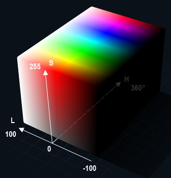 Цветовая модель AHSL представленная в виде параллелепипеда